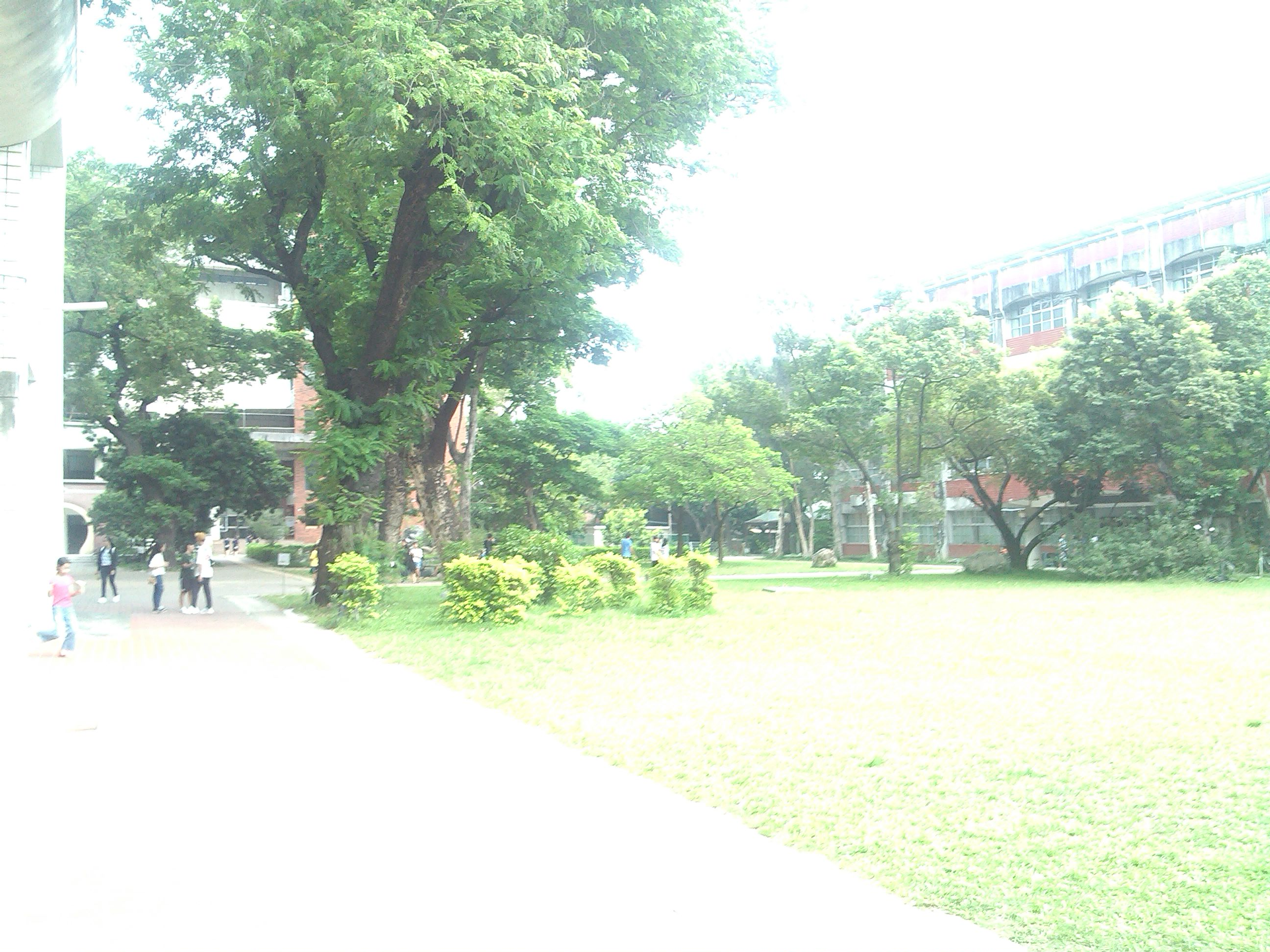 屏東女中操場